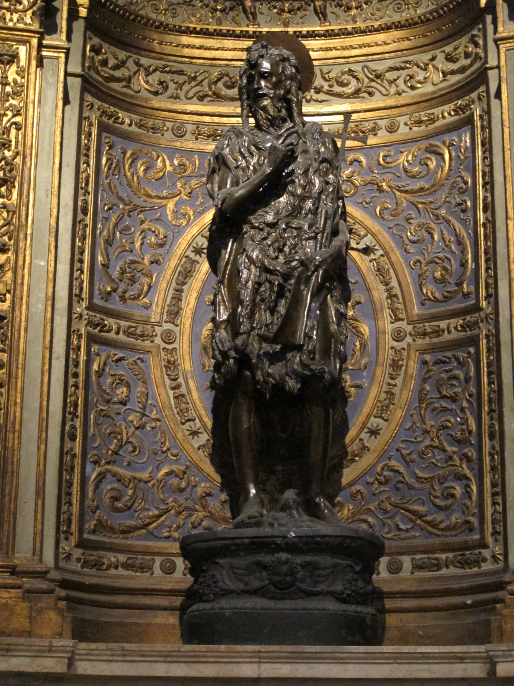 Cappella di s. giovanni, siena, 16 s. giovanni di donatello